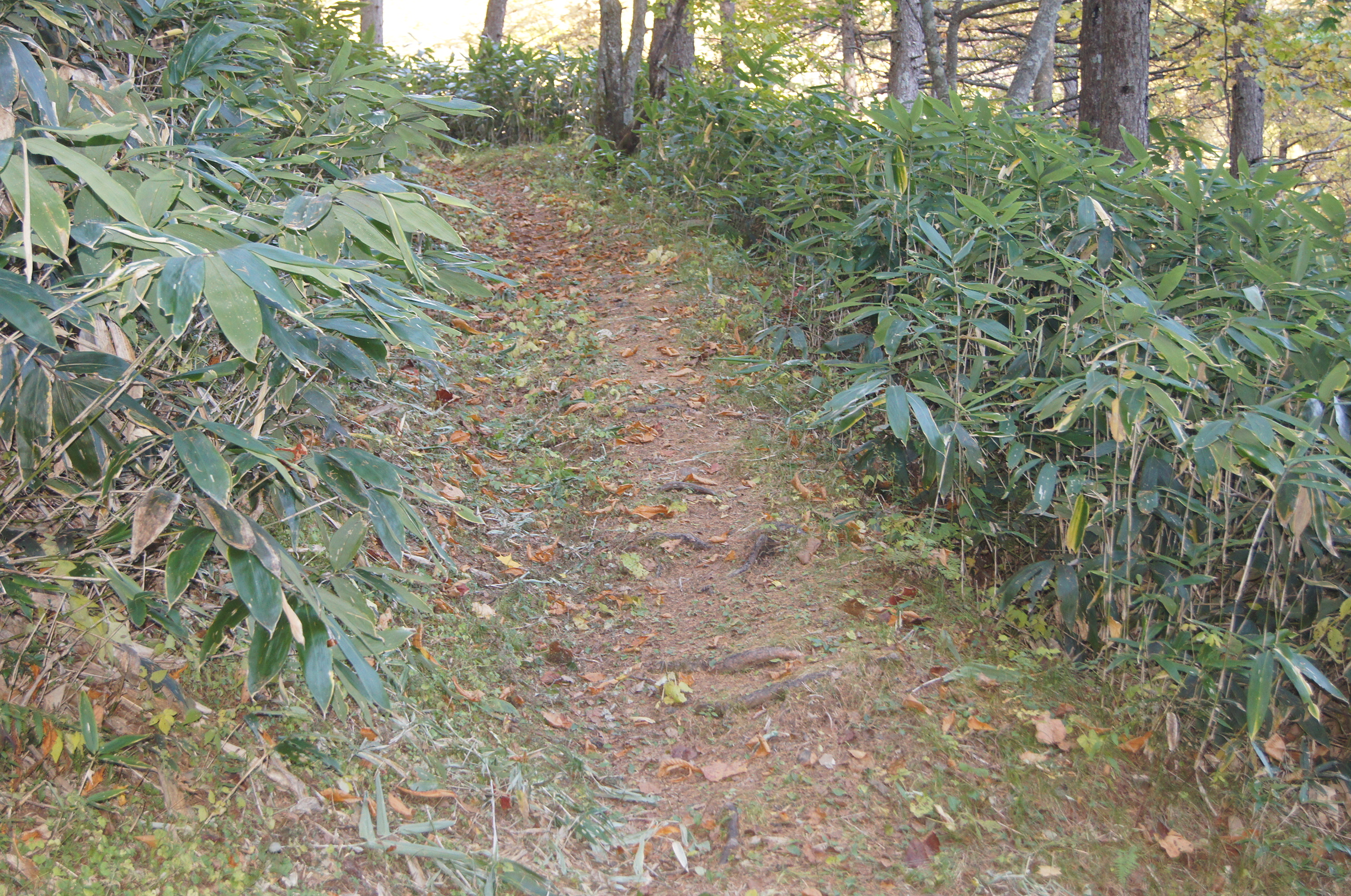 長野県史跡として当時のままに残されている旧野麦街道